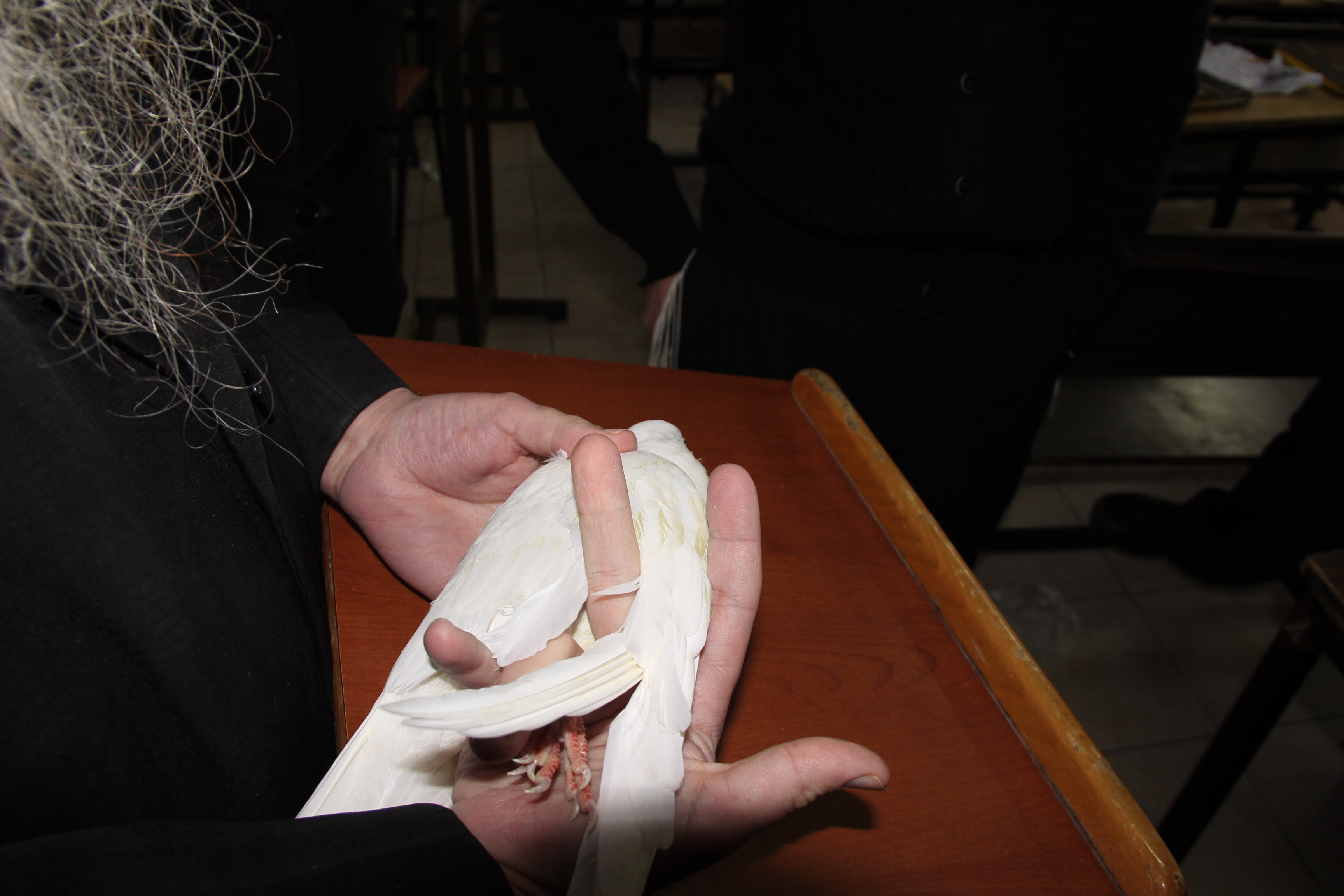 איך ביצוע מליקה בבית המקדש